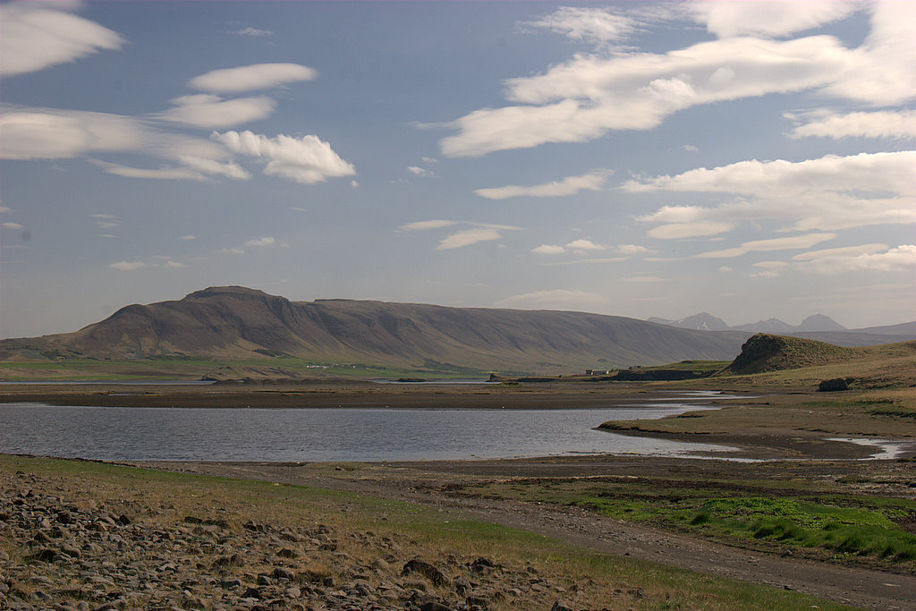 Hvalfjörður